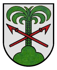 Wappen von Oberbalzheim in der Gemeinde Balzheim